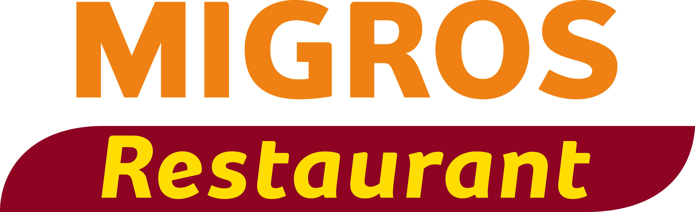 فثفغفغ'غ'(غثفثفلقفلاغصا(-غاقفغافاثفيغ